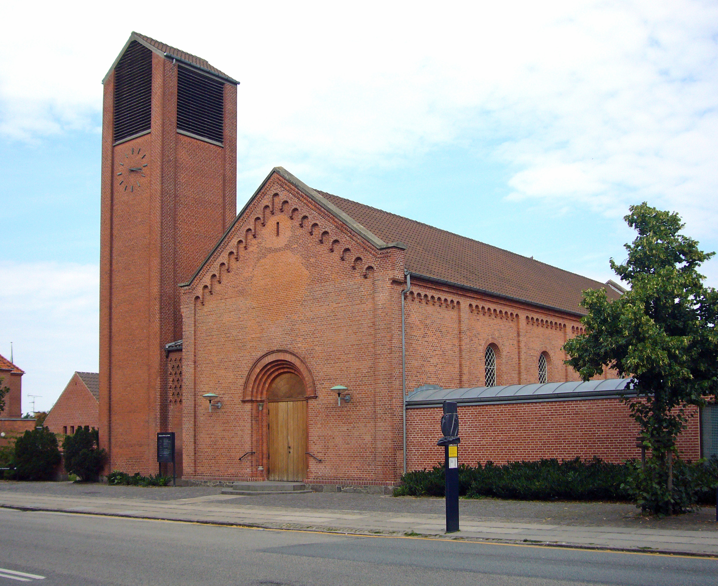 Kastrup Kirke, Copenhagen, Denmark.